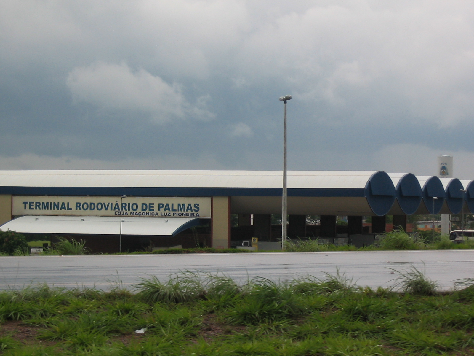 Terminal Rodoviário de Palmas, TO, Brasil.